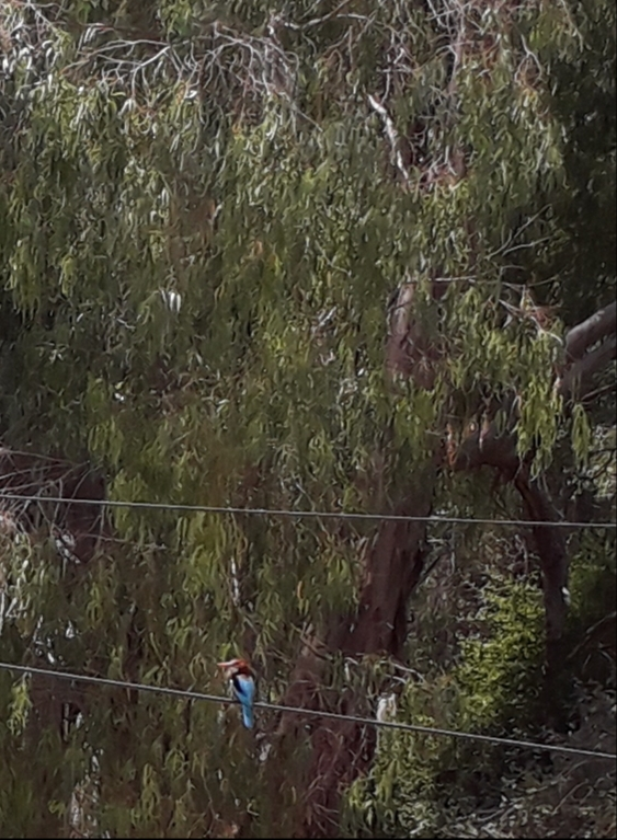 שלדג לבן חזה בעמדת תצפית בנחל גלילות